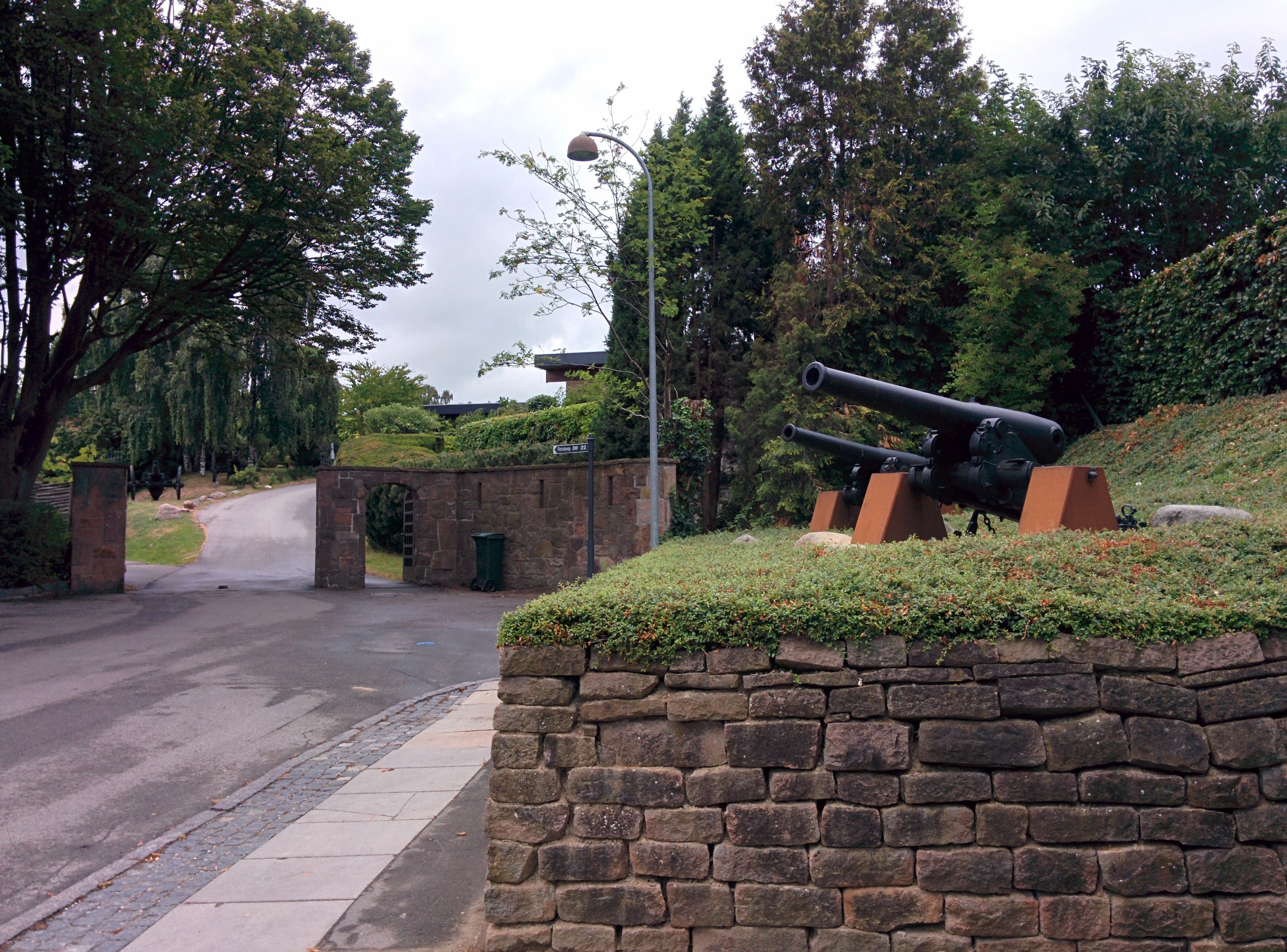 Kanoner for enden af Rosavej